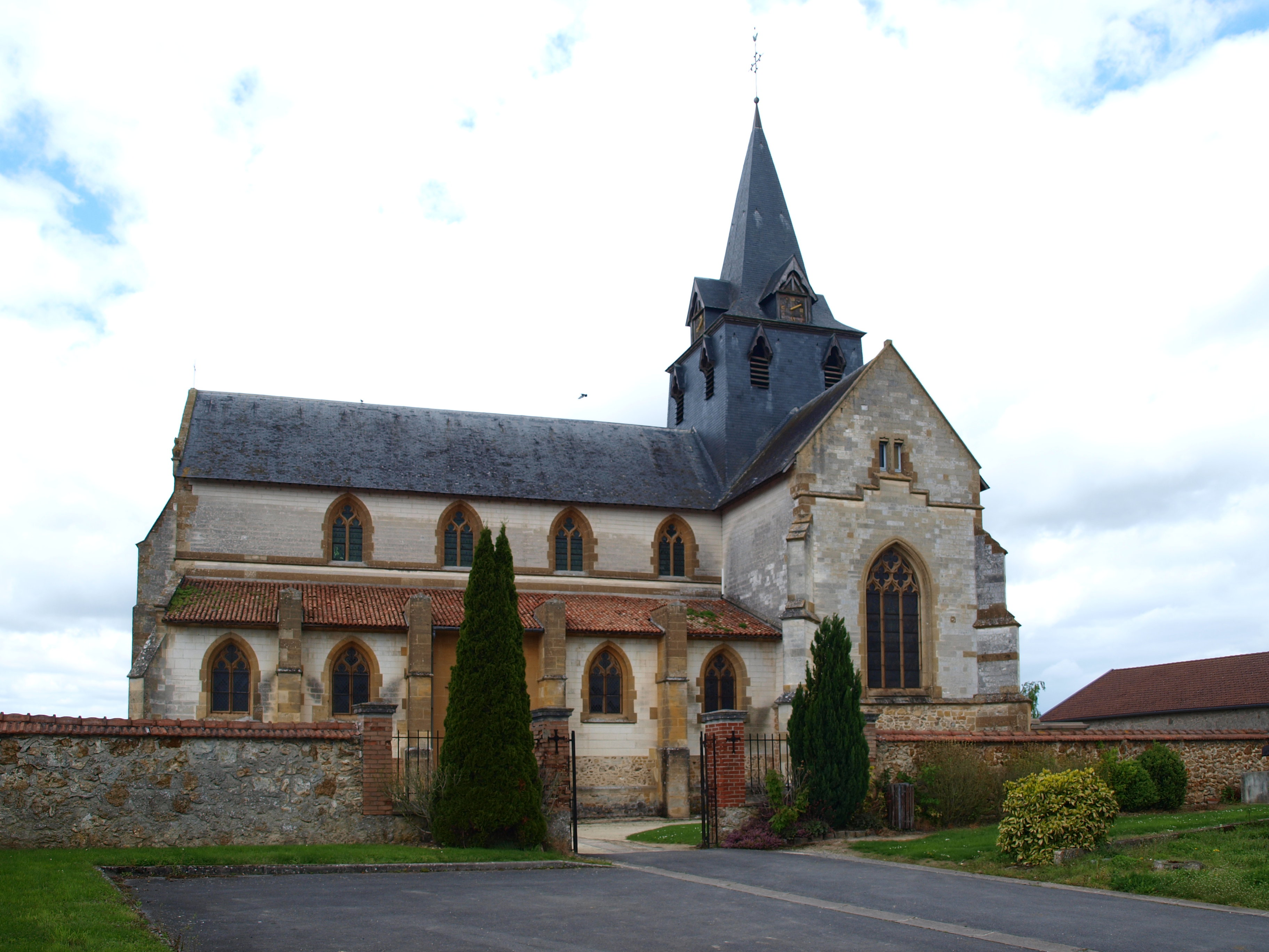 Église Saint-Martin de Sommepy-Tahure (Marne, France)